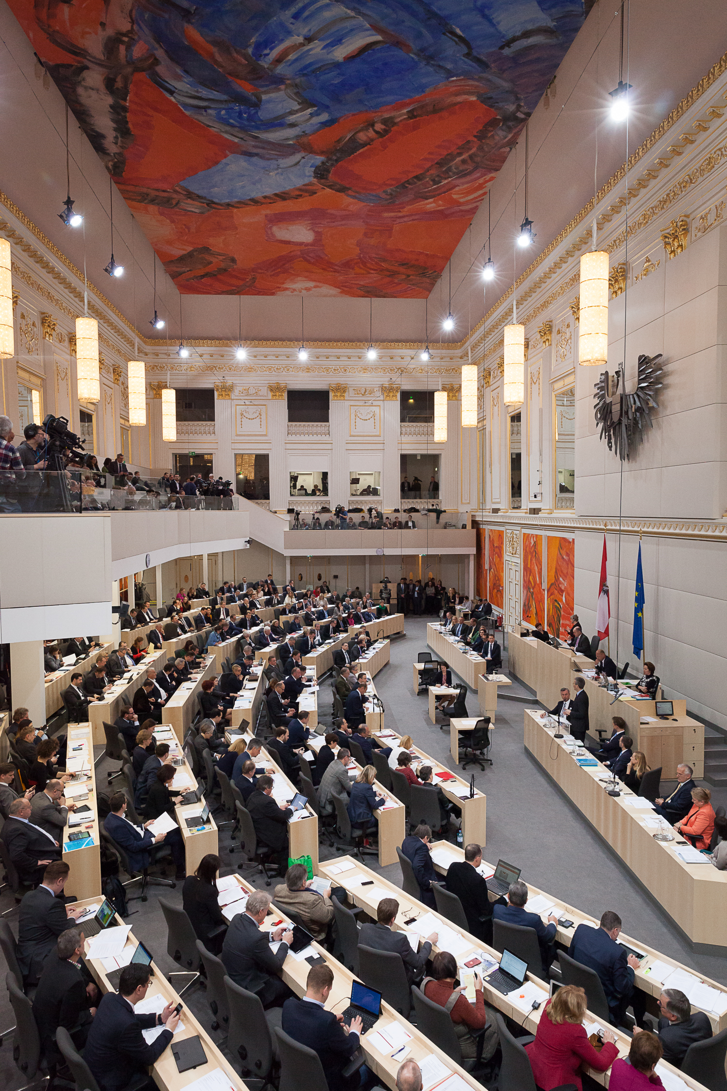 Fotocredit: BMF/citronenrot